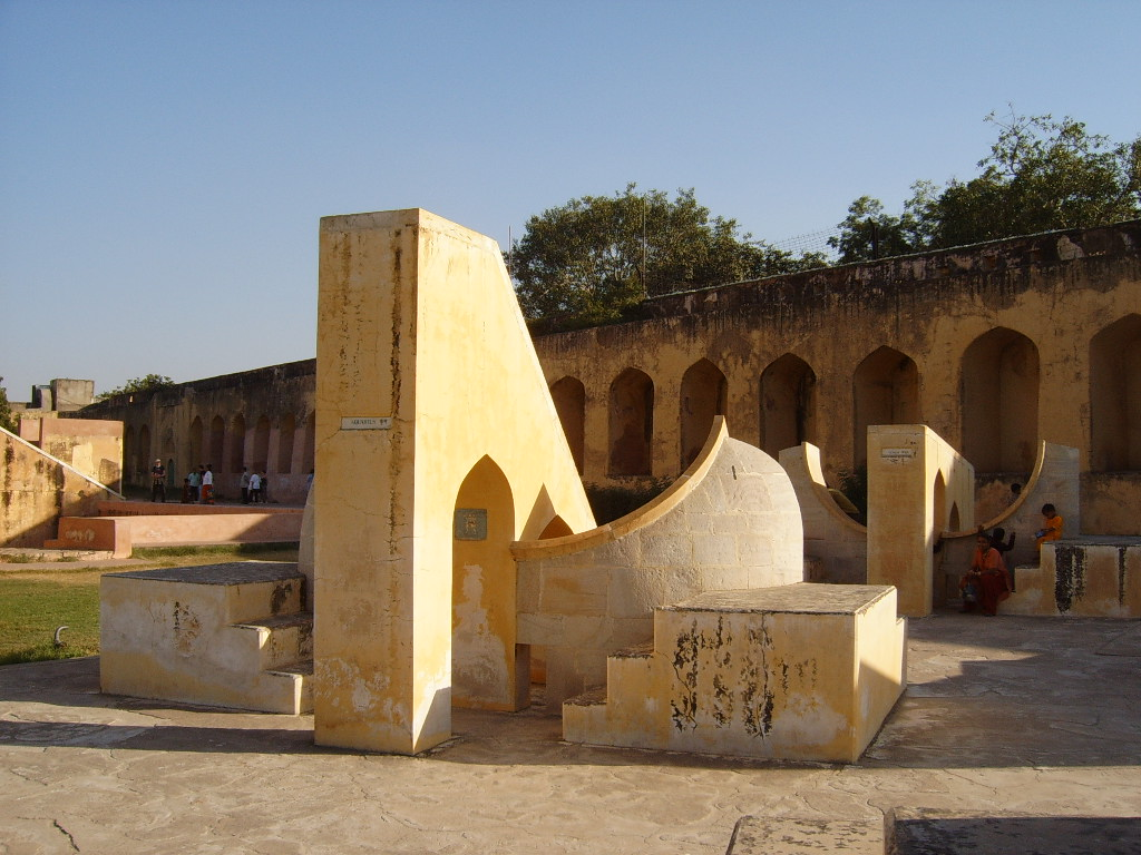 Observatoire de Jaipur, les cadrans zodiaquaux. Novembre 2005